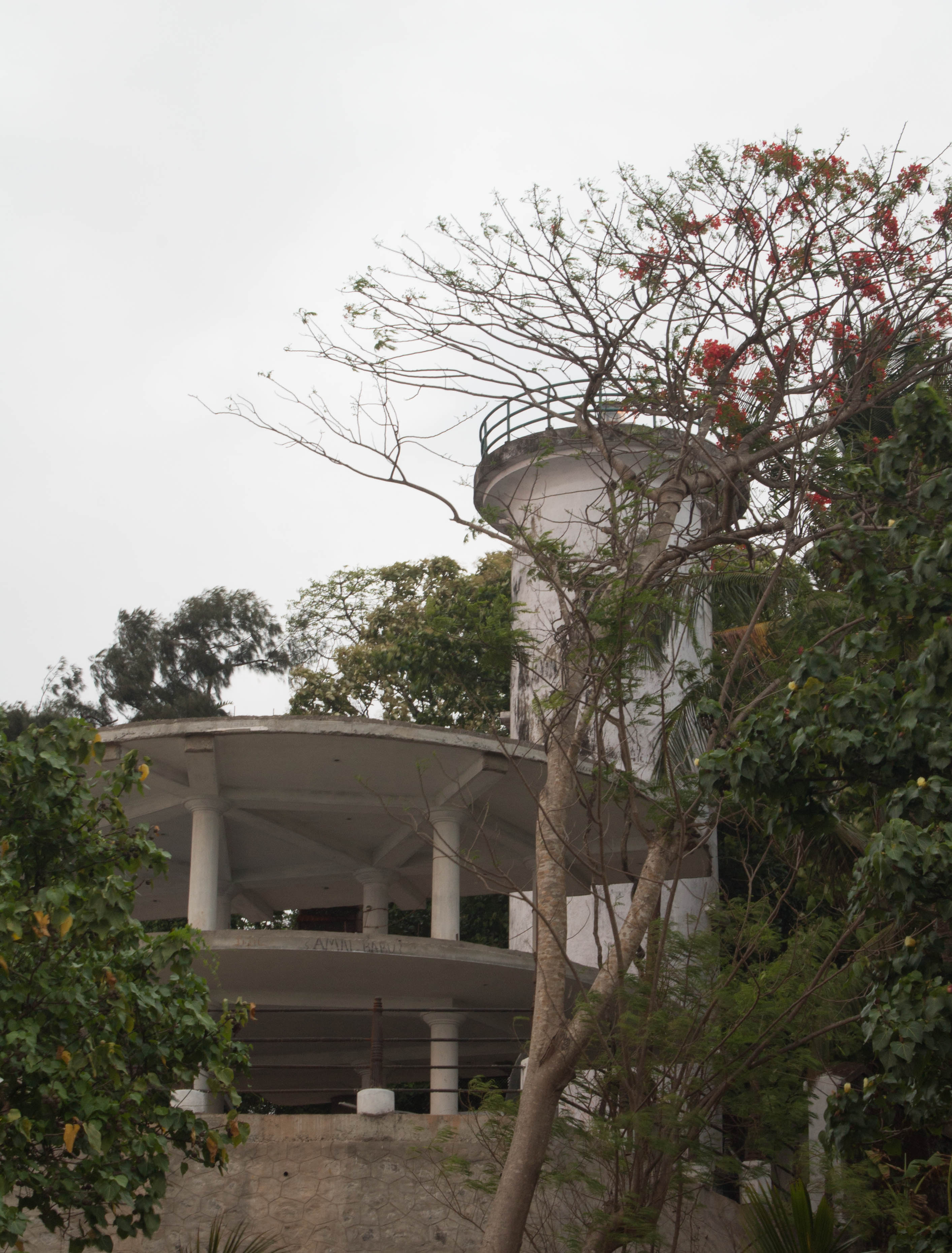 മാഹി വിളക്കുമാടം